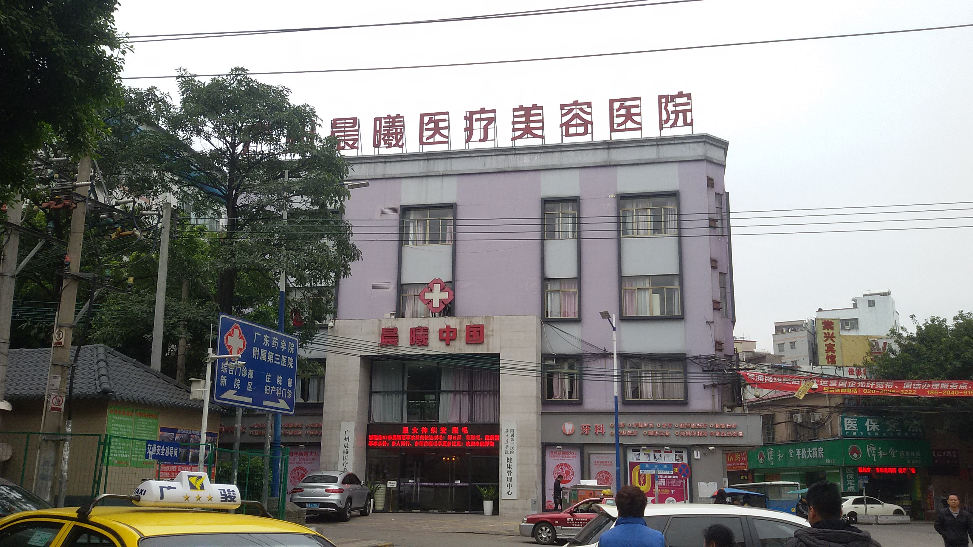 粵語: 廣州晨曦醫療美容醫院